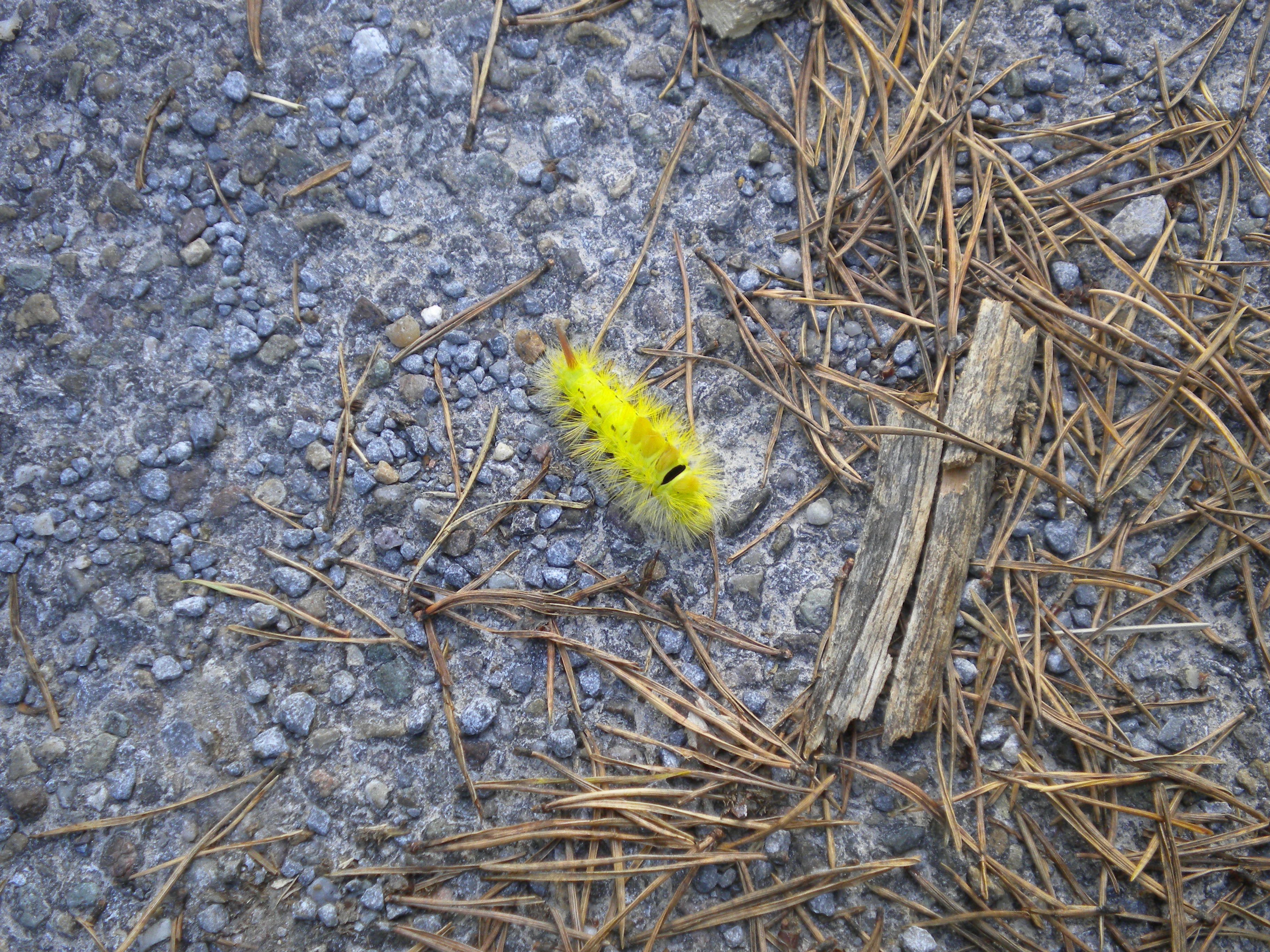 Calliteara pudibunda.